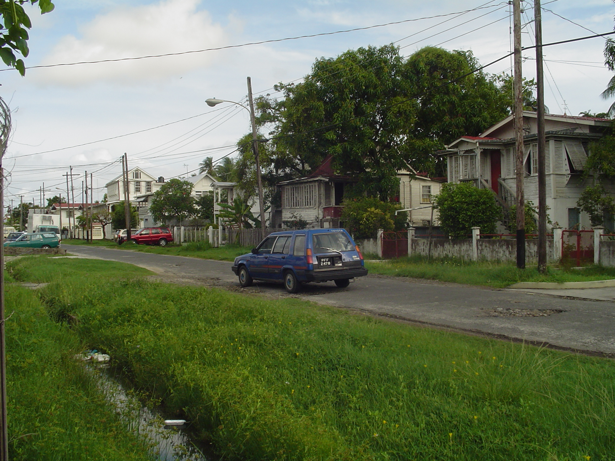 Laluni St panorama